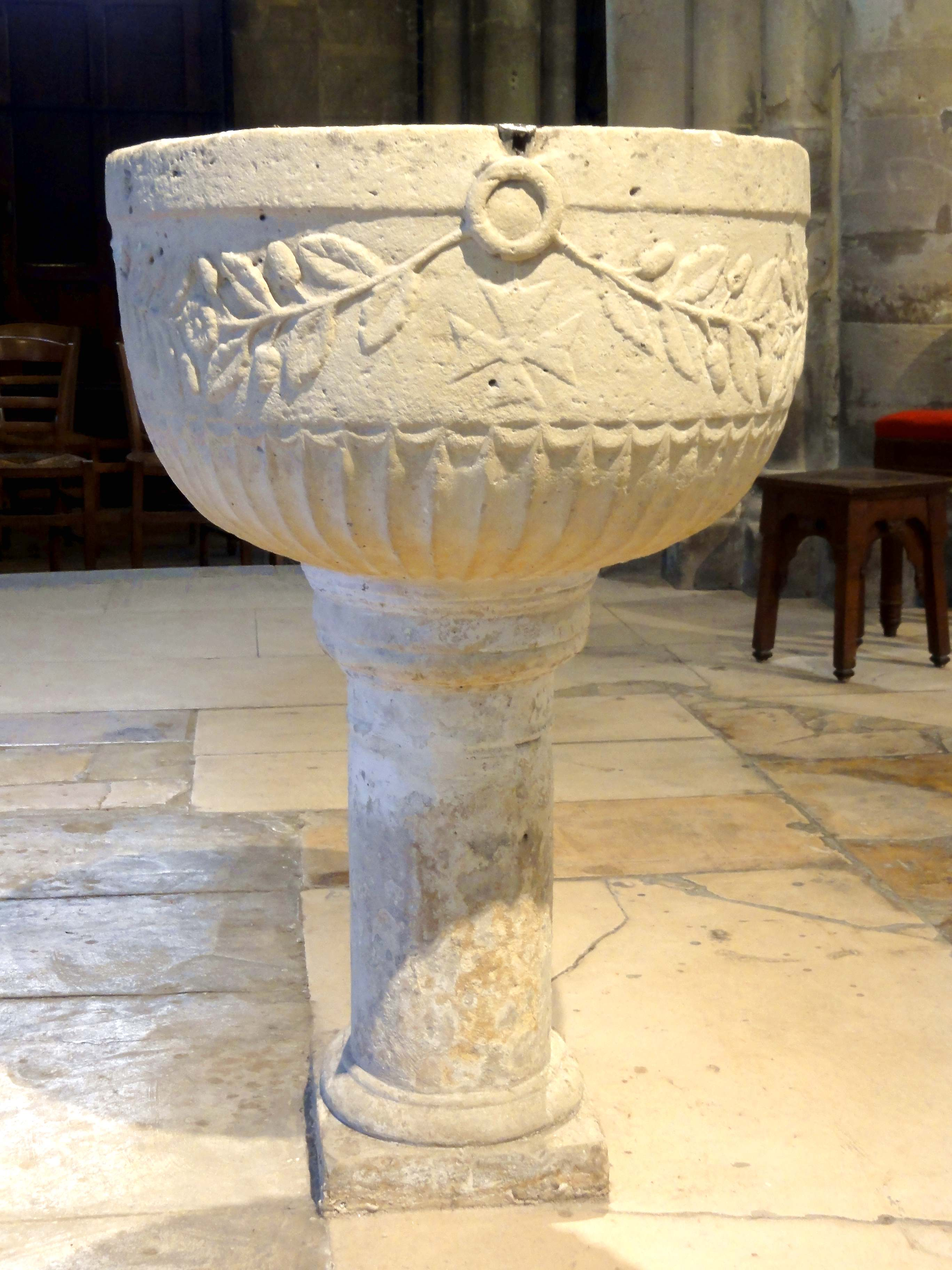 Fonts baptismaux, dans l'abside.